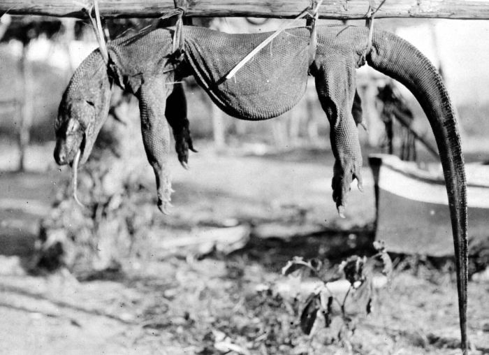 Repronegatief. Varanus komodoensis, ± 8 jaar en 5 weken.